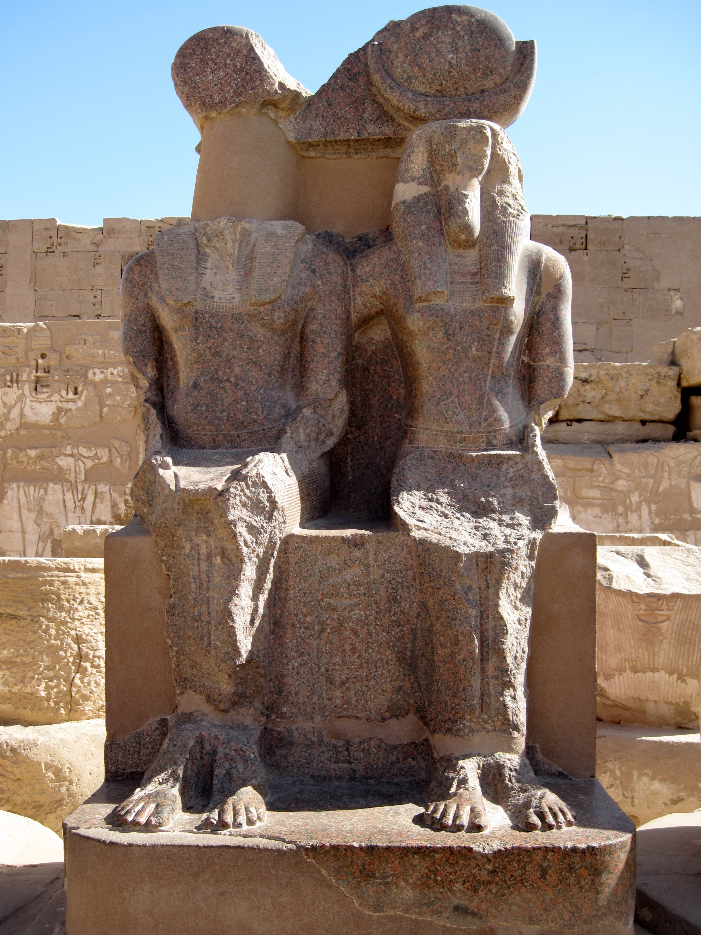 Ramses III. (ursprünglich Amenophis III.) mit dem Gott Thot, Sitzstatuen aus Rosengranit im Totentempel Ramses’ III. in Medinet Habu, Ägypten